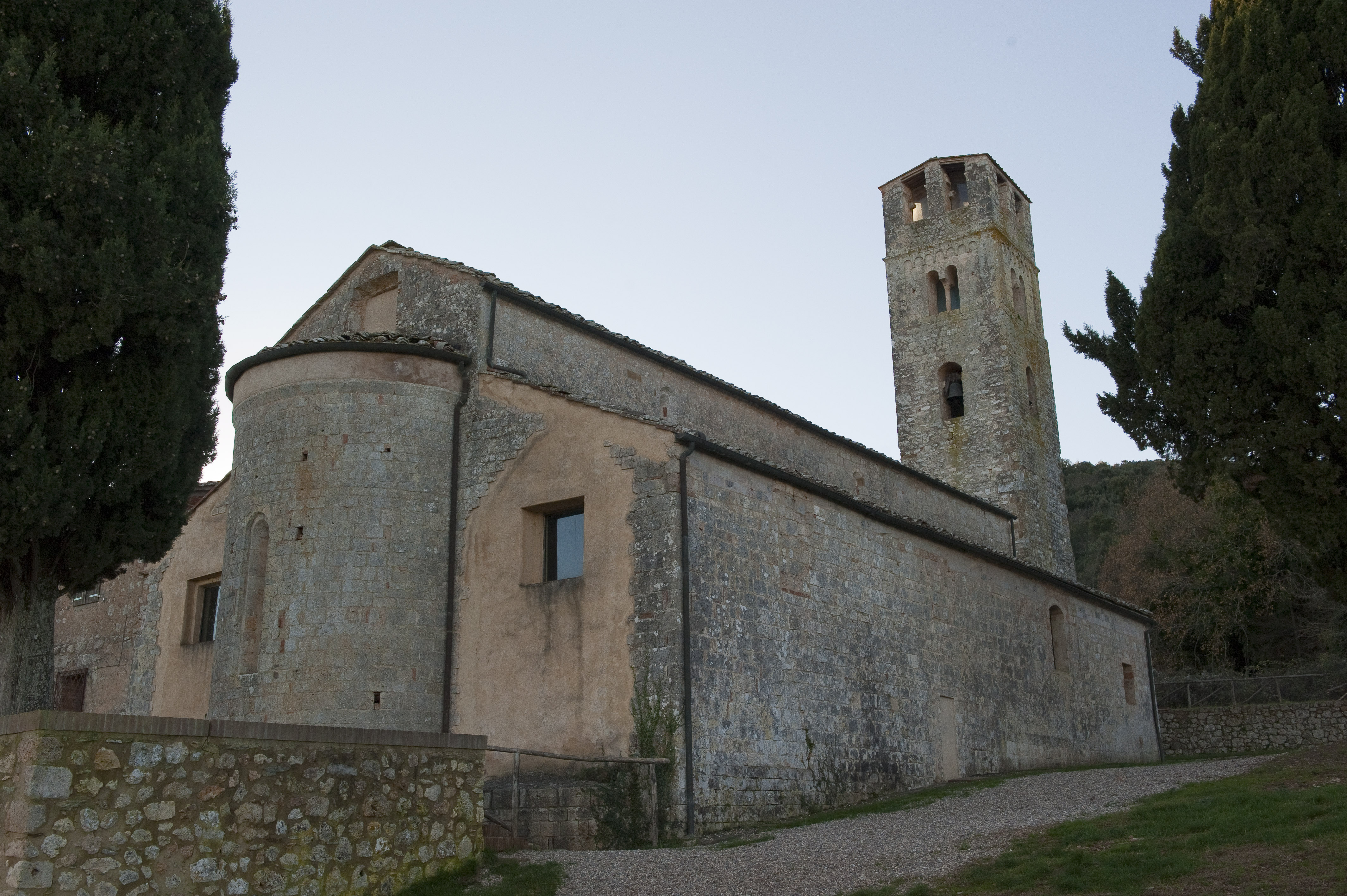 Abside della chiesa di San Giovanni Battista a Pernina, Sovicille